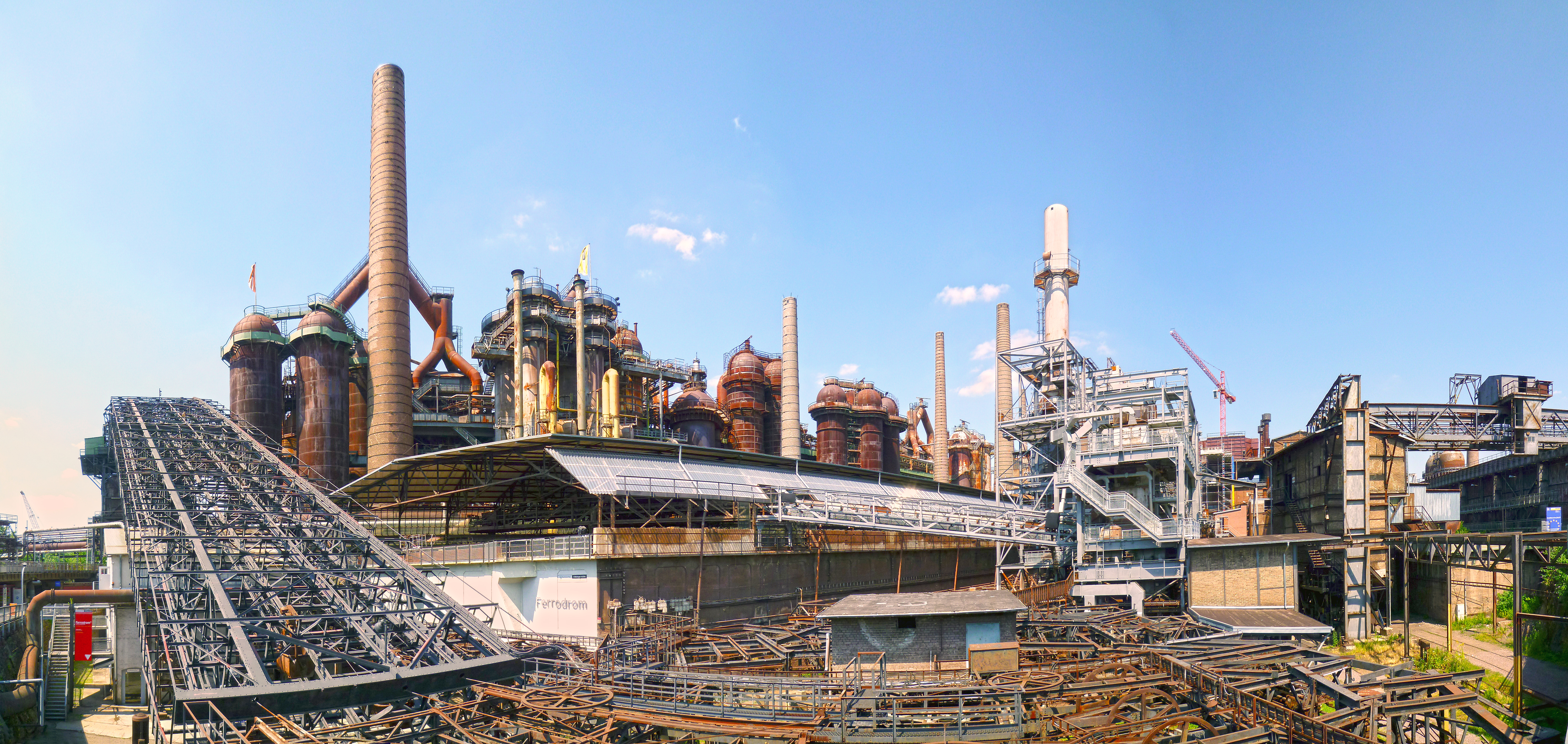 Völklinger Hütte